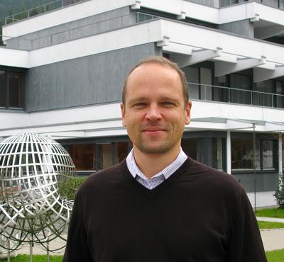 Foto di Friedrich Eisenbrand